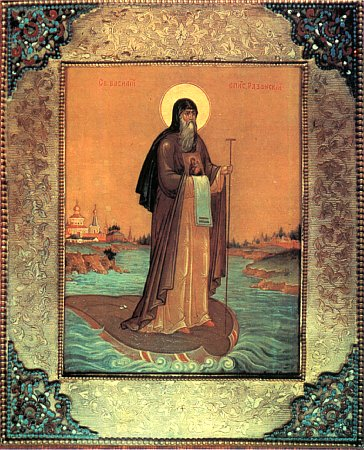 Saint Vasilij from Rjazan